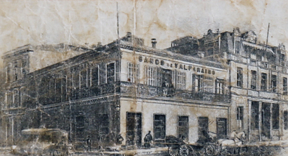 Banco de Valparaiso